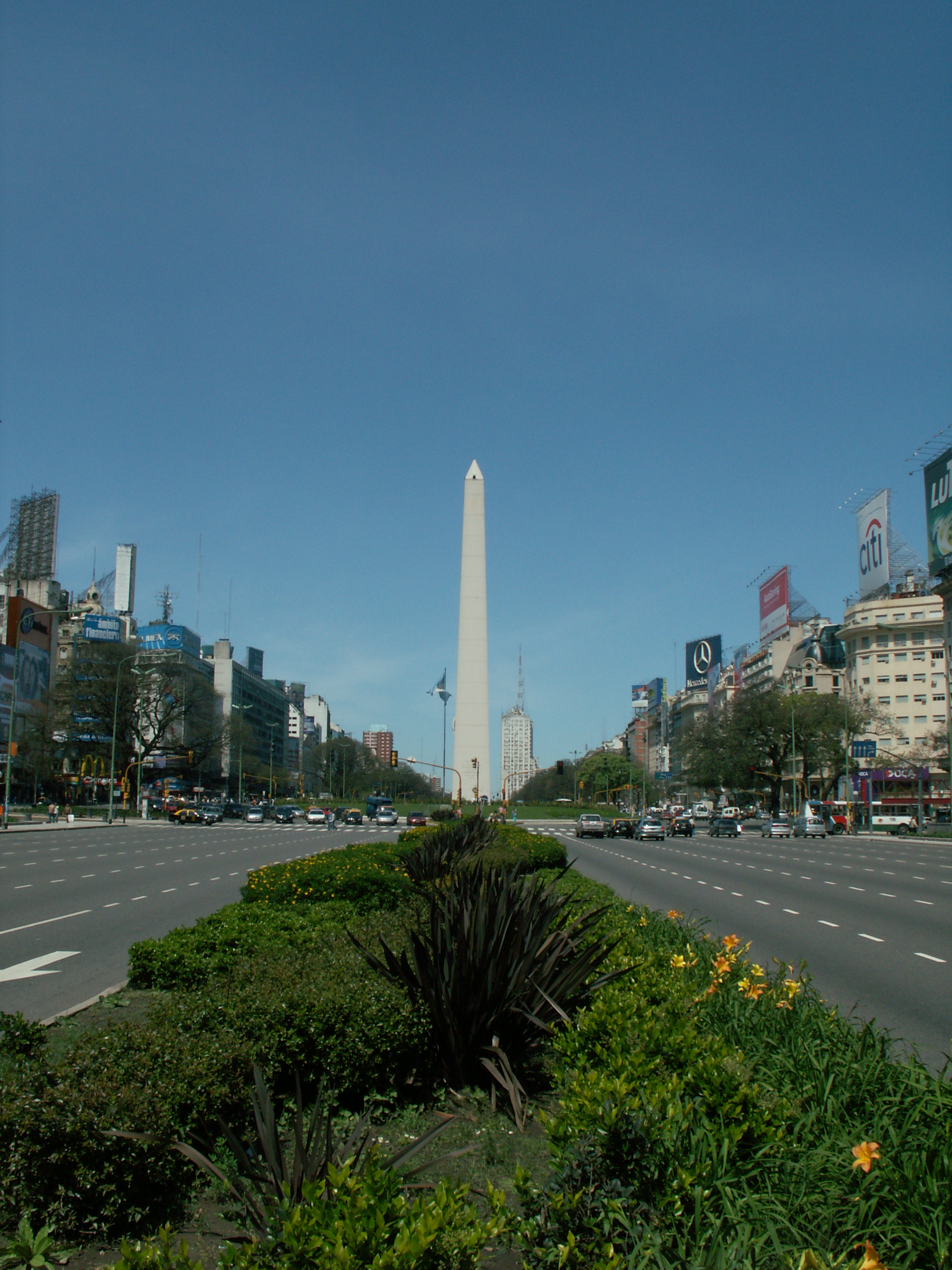 El Obelisco